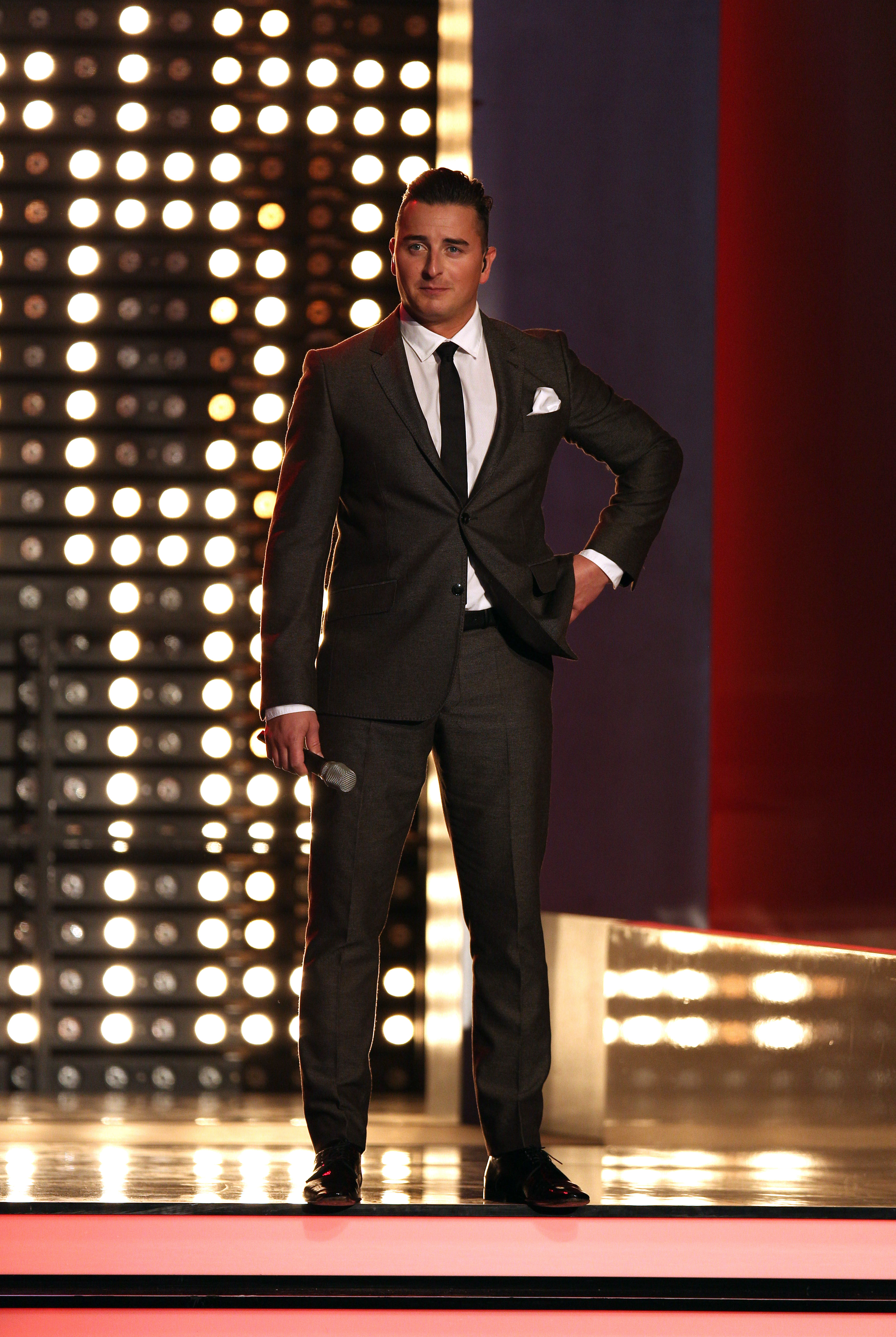 Wetten, dass.. ? 214. show in Graz, 8. Nov. 2014 Andreas Gabalier at 214. Wetten, dass.. ? show in Graz, 8. Nov. 2014